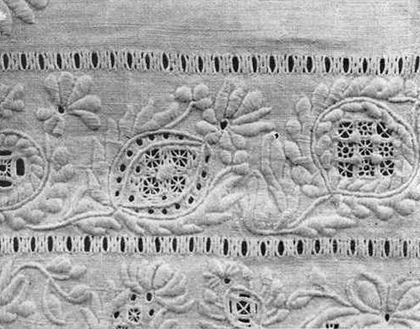 Detail of Hedebo embroidery, Denmark, before 1915